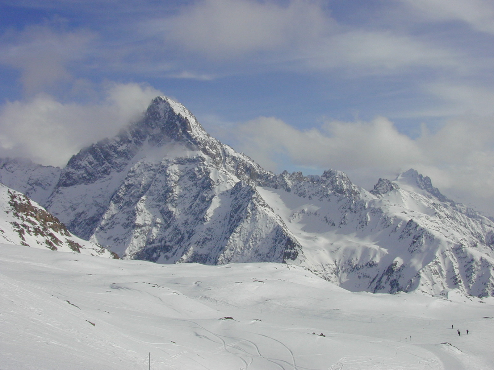 Aiguille du Plat de la Selle from Les Deux Alpes side.